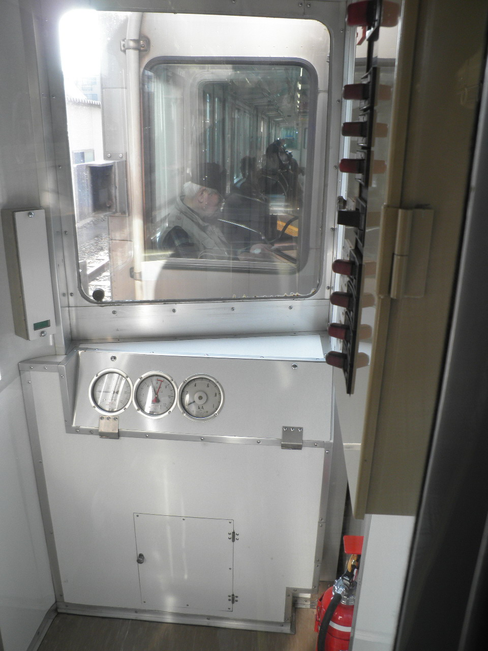 中間に組み込まれた先頭車の運転台撤去跡